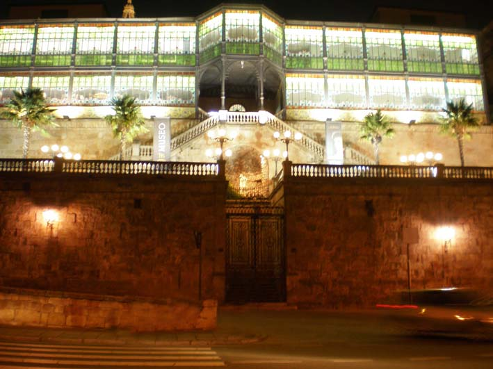 Casa Lis de noche